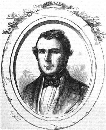 Théodore Ducos.